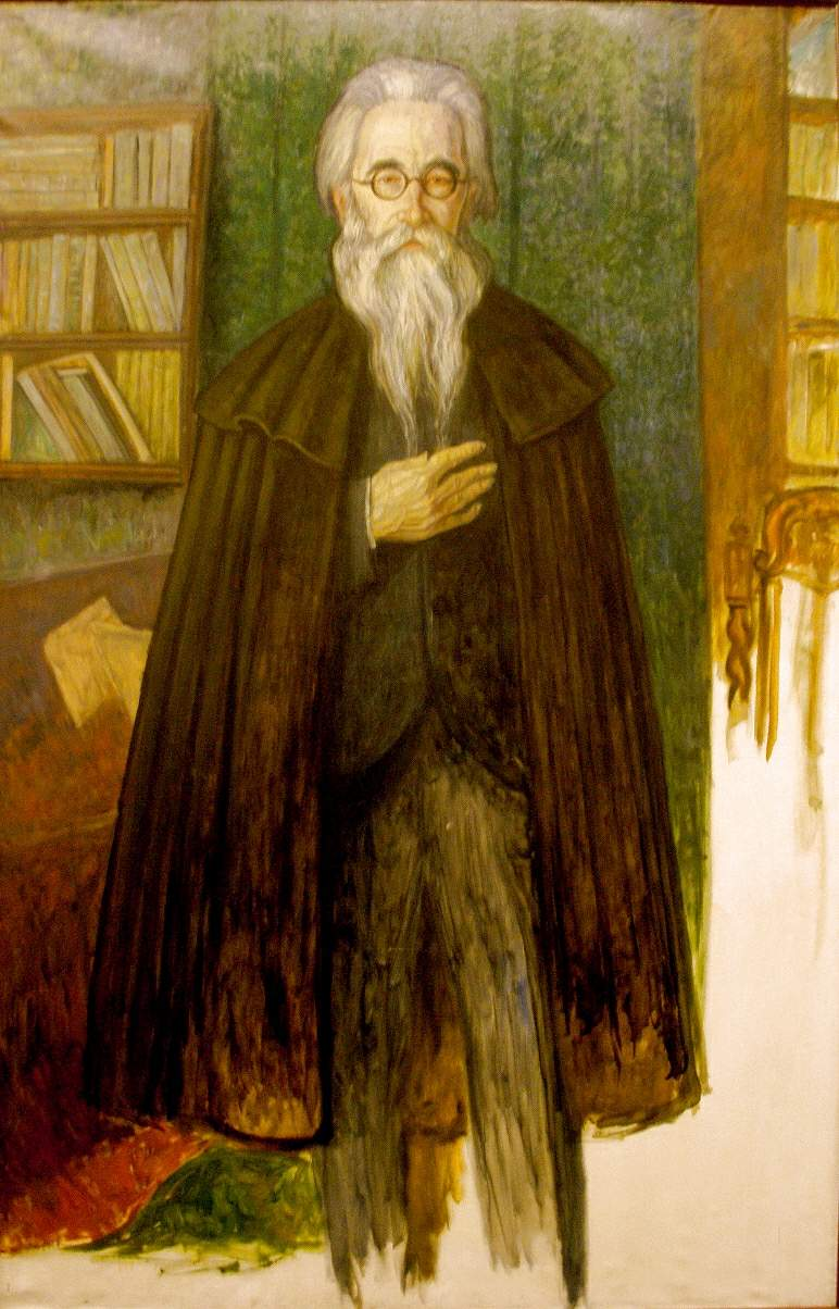 Vitoria - Museo de Bellas Artes de Álava, 'Valle-Inclán en pie' (Juan de Echevarría, 1922)